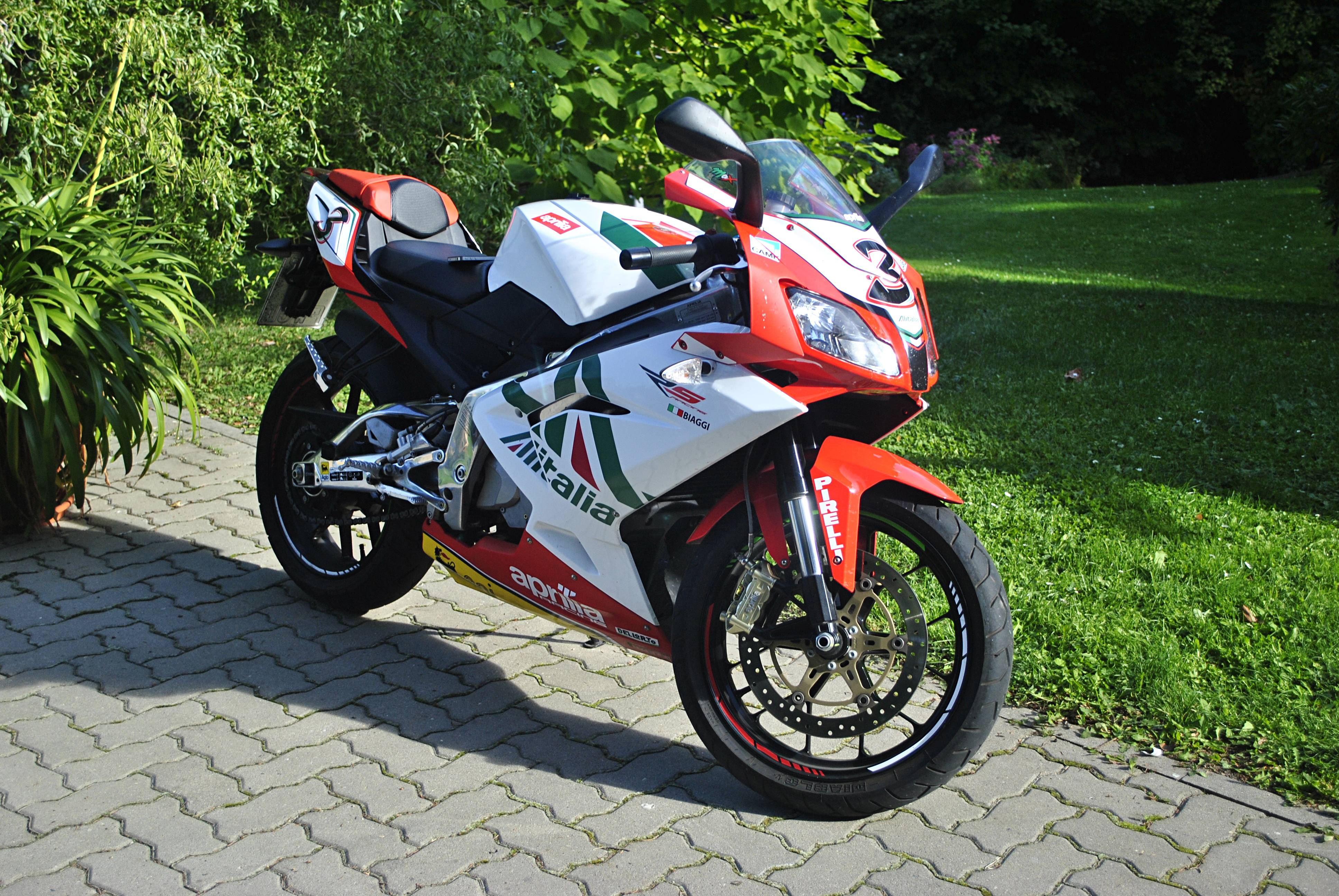 Aprilia RS 125 Alitalia Full Power - 2011 with 30HP and Arrow